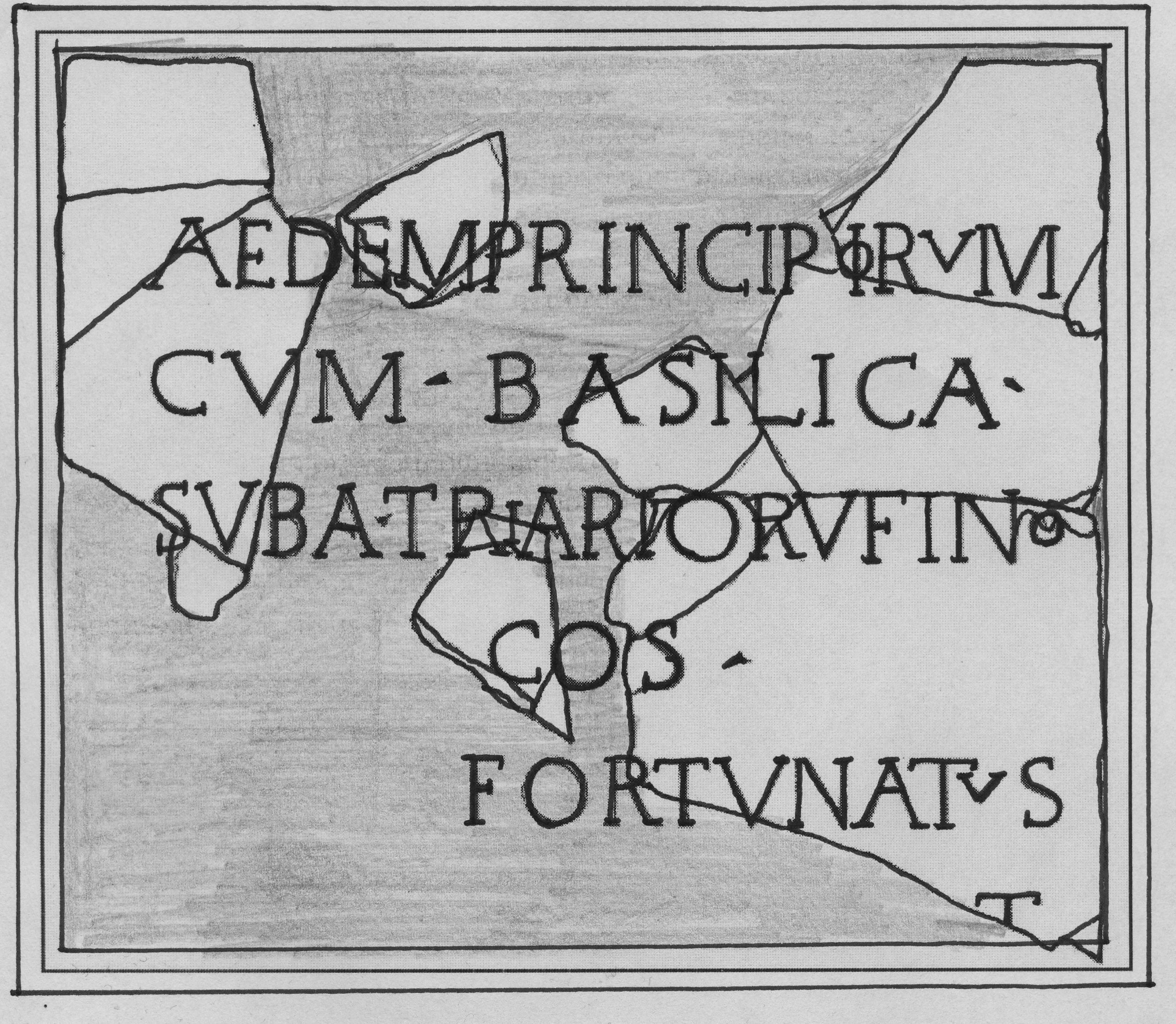 Skizze der Bauinschrift aus dem Kastell Regulbium nach Ian Richmond (1960)